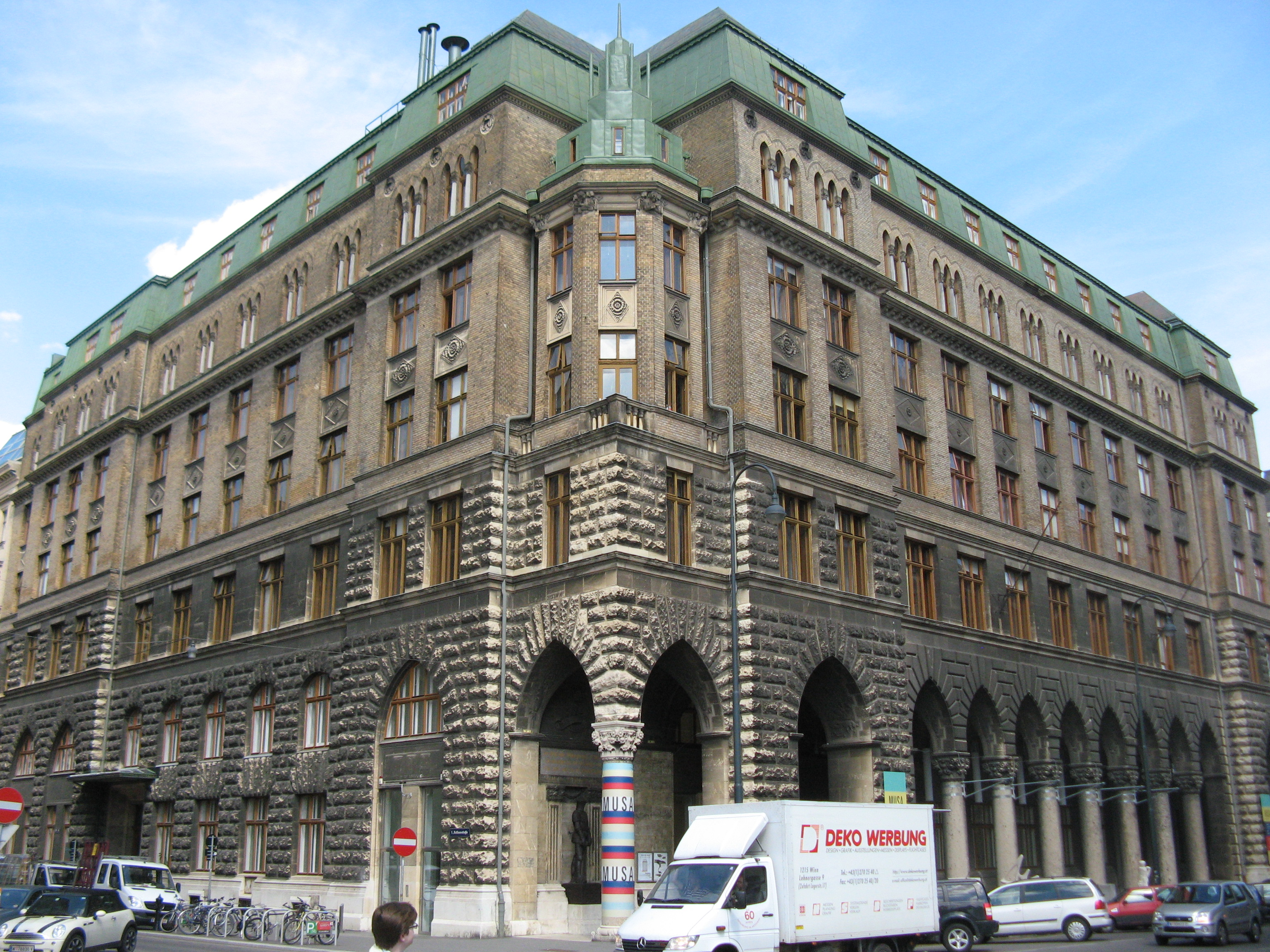 Städtisches Amtshaus (1913-1918) von August Kirstein, Felderstraße 6-8, Wien-Innere Stadt